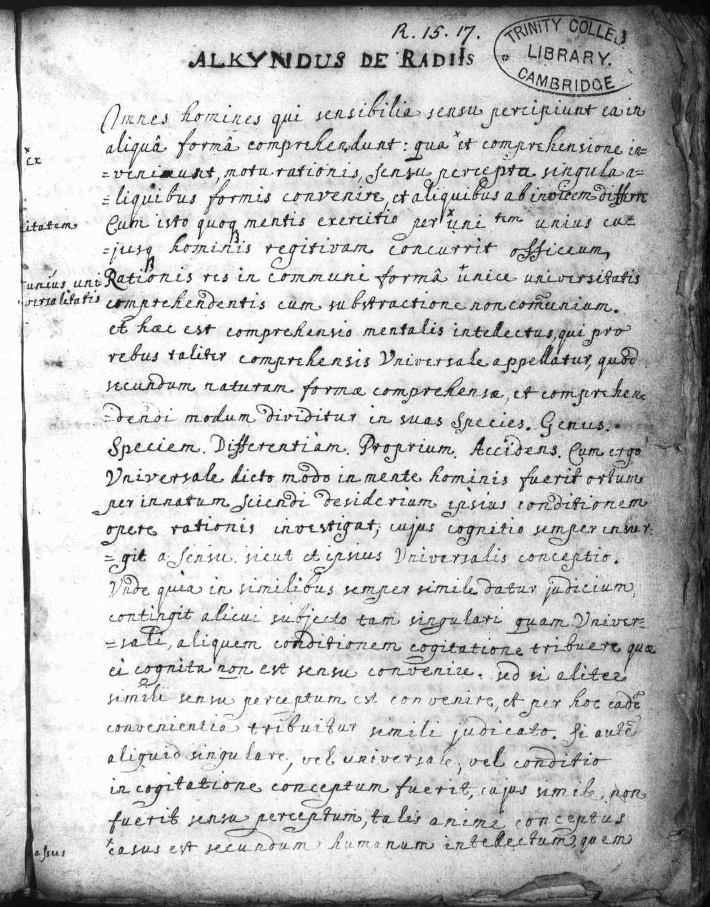 Fotogramma 2